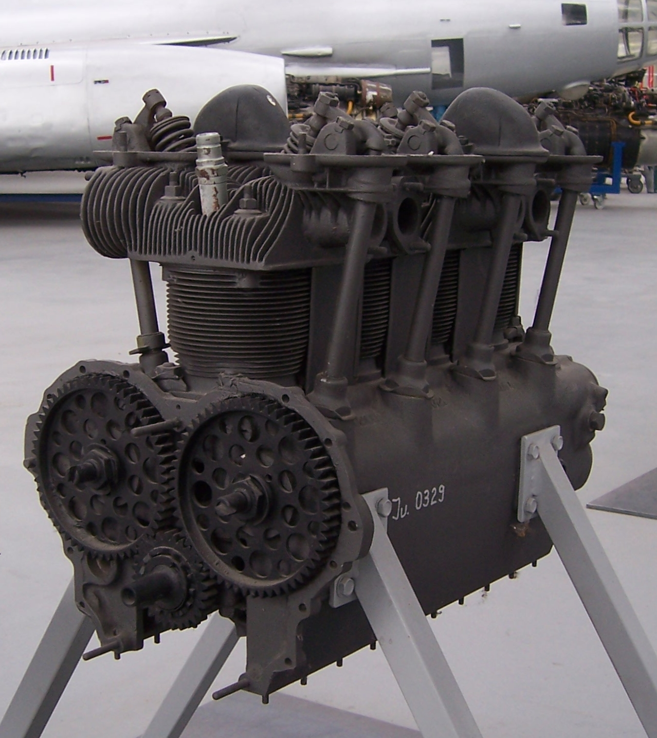 Zündapp Z 9-092 im Technikmuseum Hugo Junkers Dessau 2008-08-06